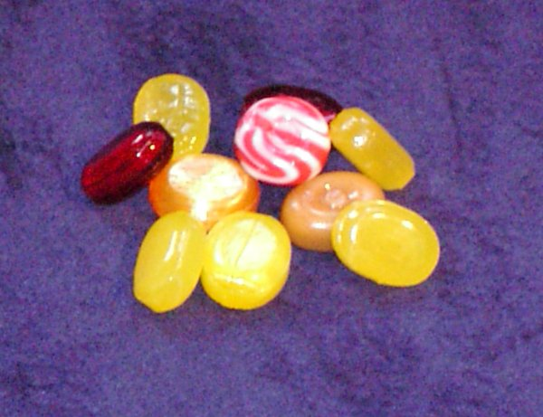 Beschreibung: Verschiedene Bonbons Quelle: fotographiert am 6. Juni 2004 Fotograf oder Zeichner: Oktaeder Andere Versionen: Lizenzstatus: Public Domain